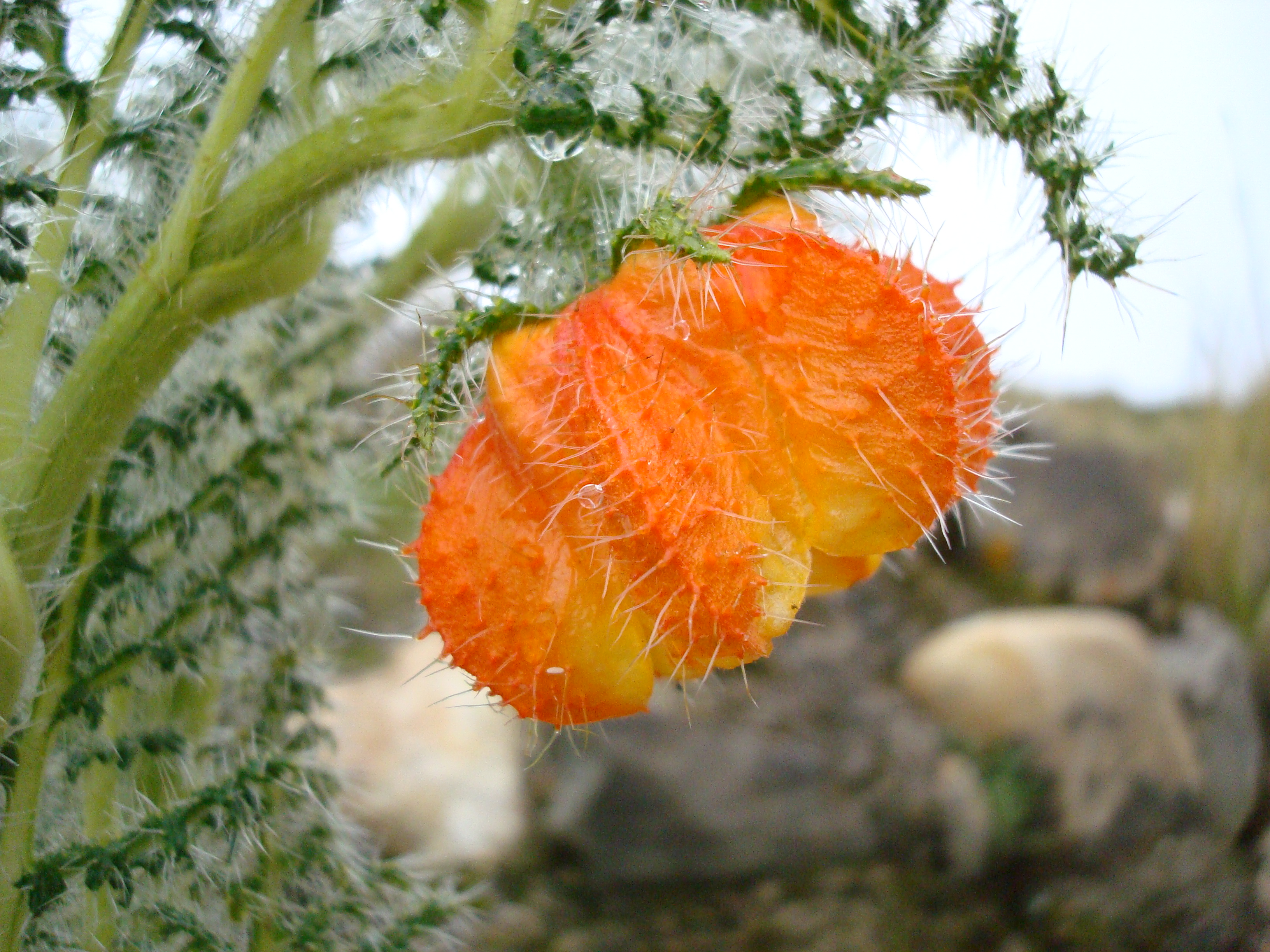 Flor de caiophora